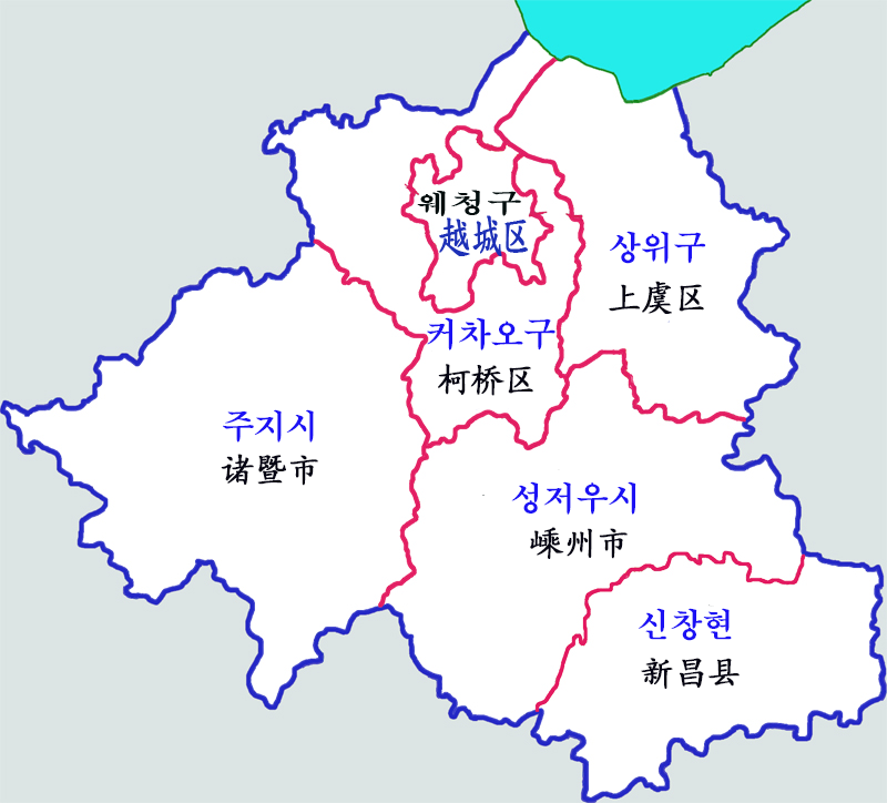 저장성 사오싱시 현급구역도